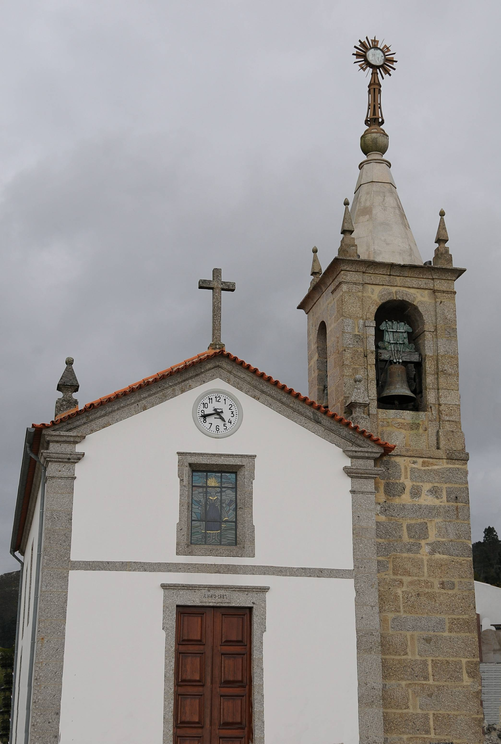 S. Mamede de Este Church in Braga Portugal